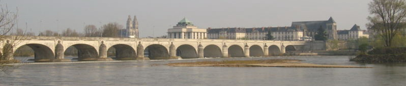 Pont Wilson à Tours.